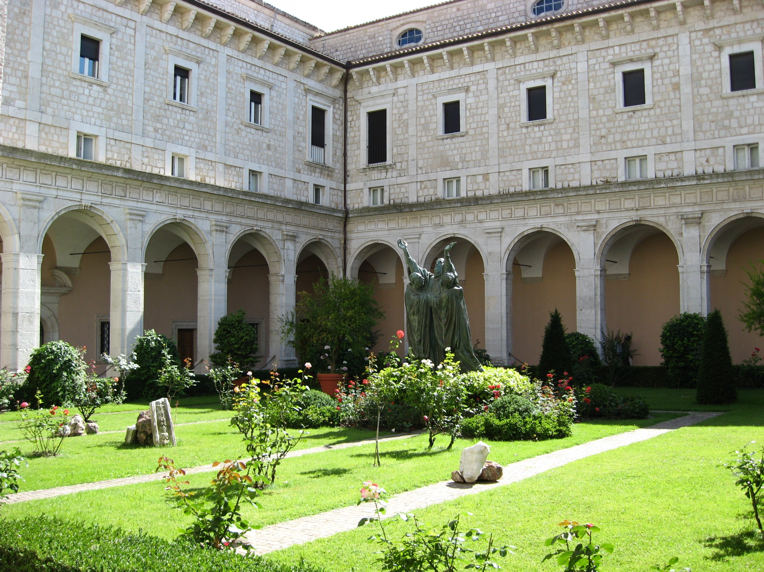 Monte Cassino Abbey